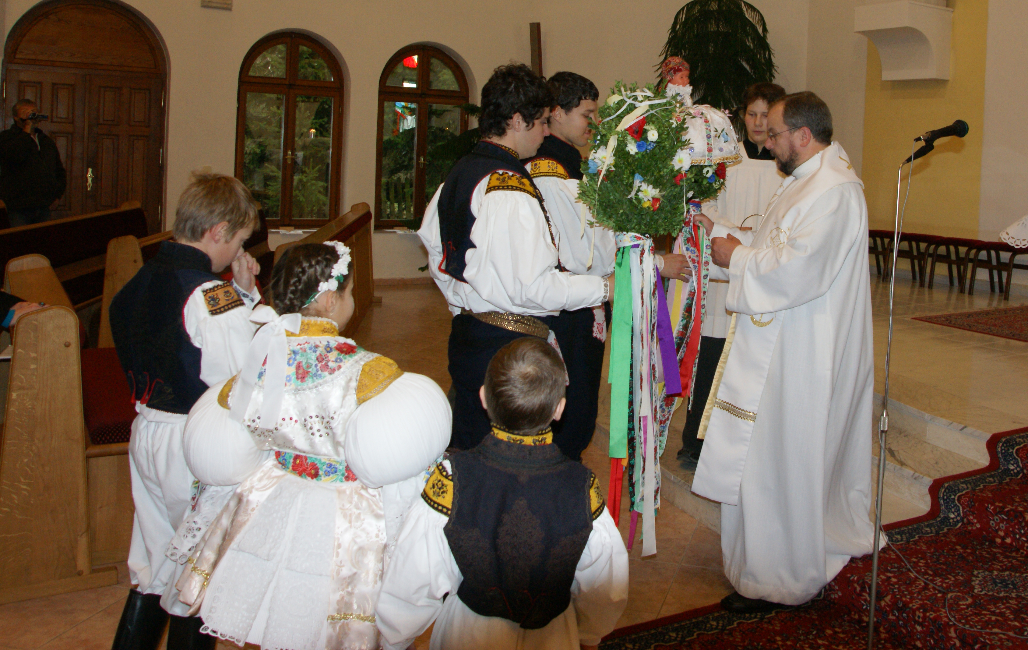 Svěcení velkého a malého hodového práva. Kostel Nedachlebice, Martinské hody 2010.